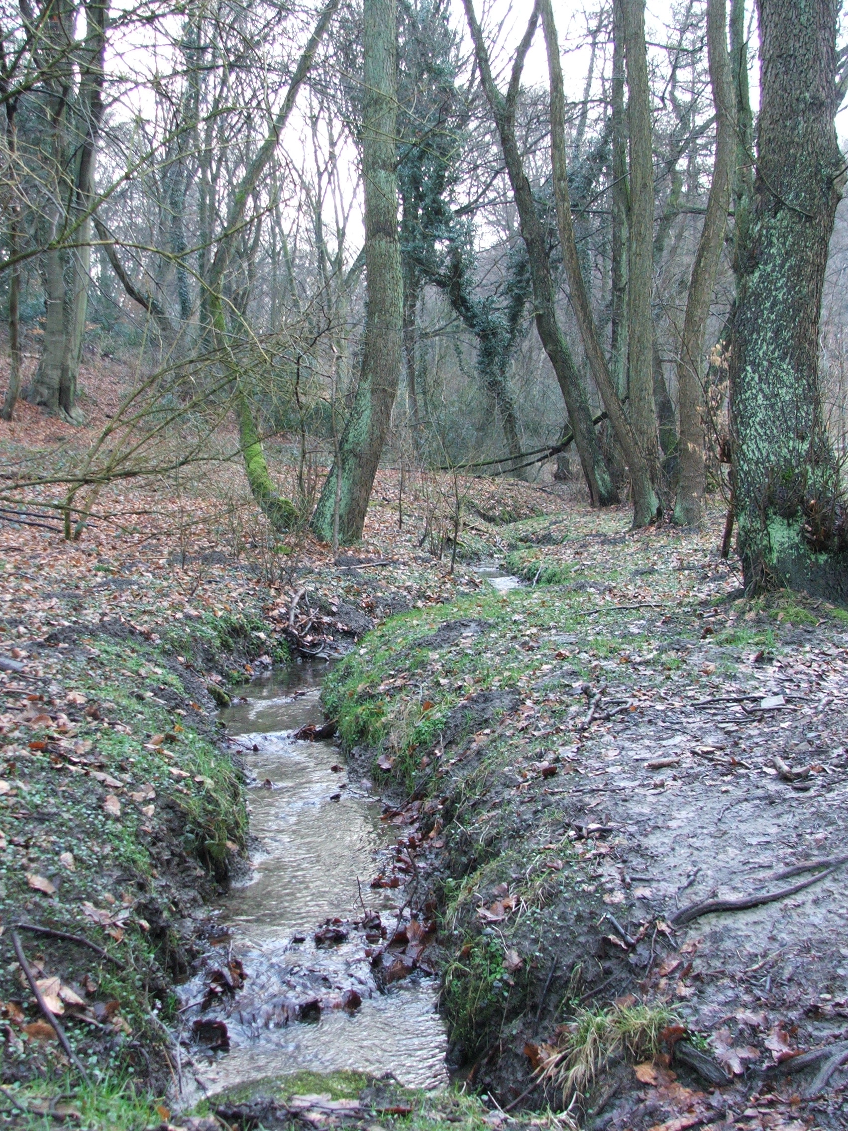 Hörsterholzer Bach, Bochum-Dahlhausen